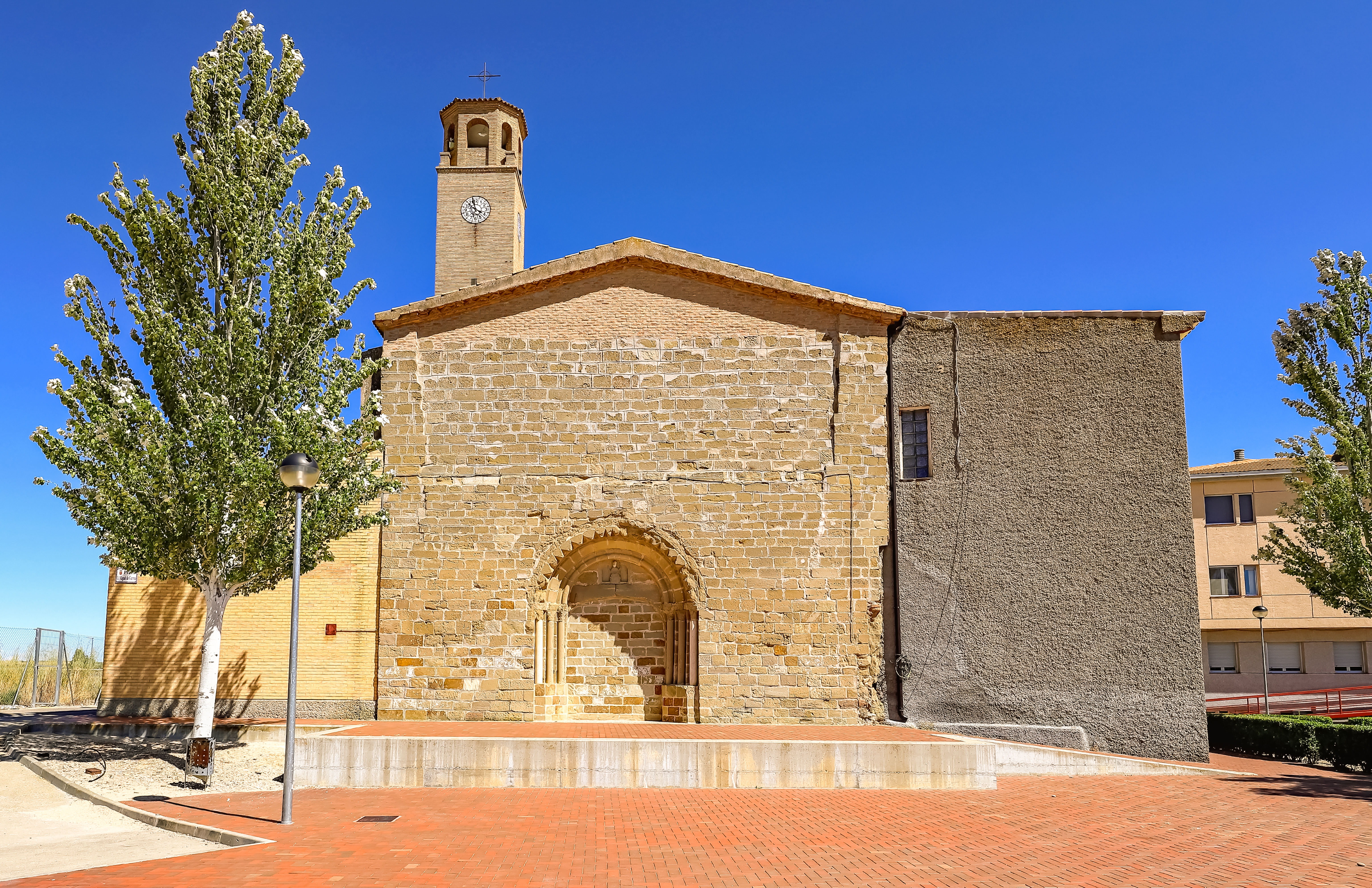 Gurrea de Gállego es un municipio de la comarca Hoya de Huesca, en la provincia de Huesca.